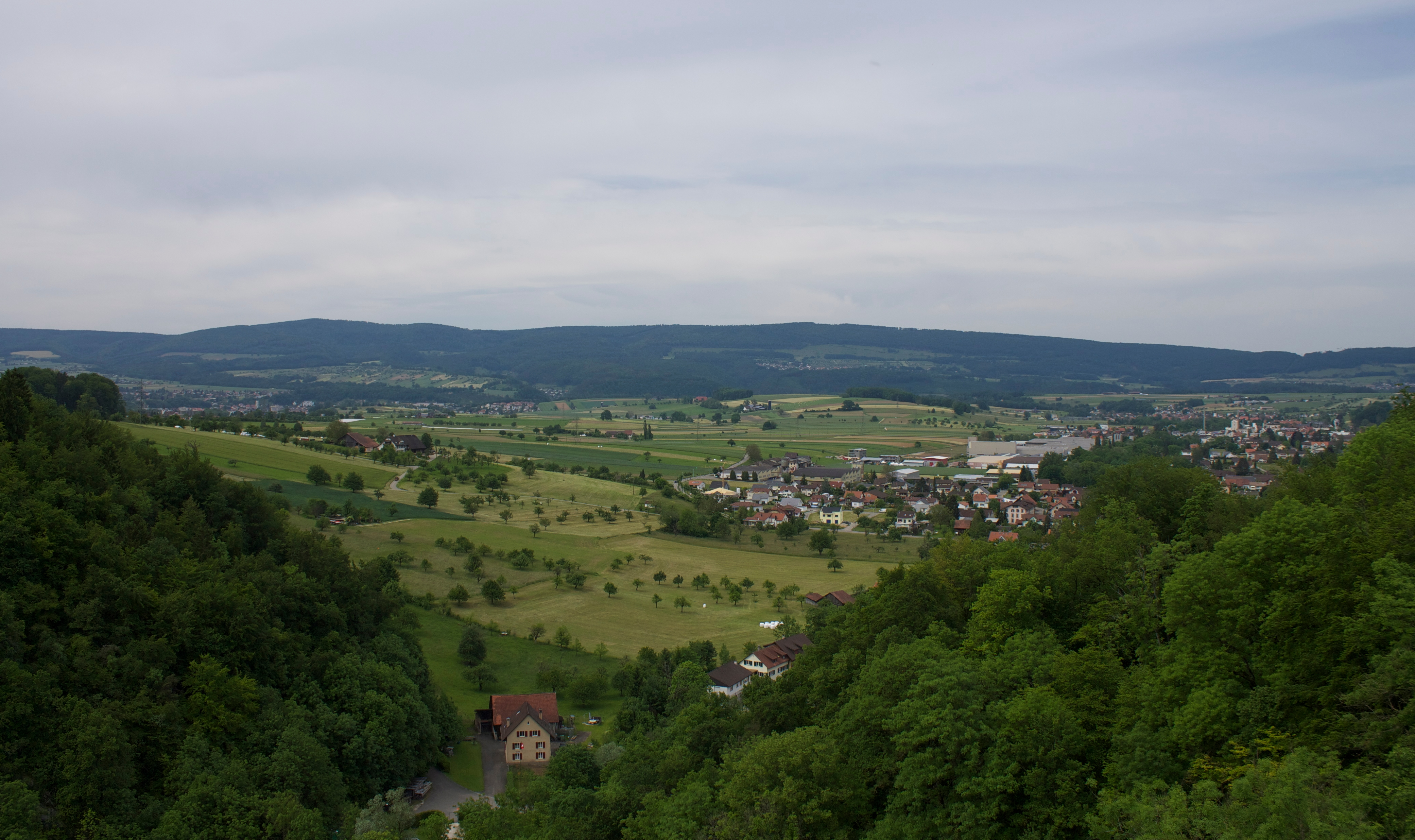 Blick Richtung Laufental von der Ruine Neu-Thierstein aus. Im rechten Bildteil sind Teile von Brislach, Breitenbach und Büsserach zu sehen, auf deren Flucht man die Strasse Richtung Erschwil und Passwang erahnen kann. Die Strasse folgt der Lüssel, die durch die Talenge im unteren Bildteil fliesst. Im Hintergrund von links nach rechts: Laufen, Dittingen (schmal) und Blauen.